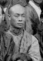 Священномучение Митрофан Цзи Чун (Китай) на съезде японского духовенства в 1882 году, Токио, Япония